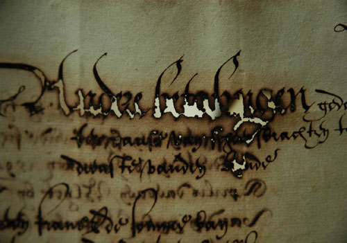 Geschreven tekst waar de inktvraat letterlijk het papier heeft weggevreten.